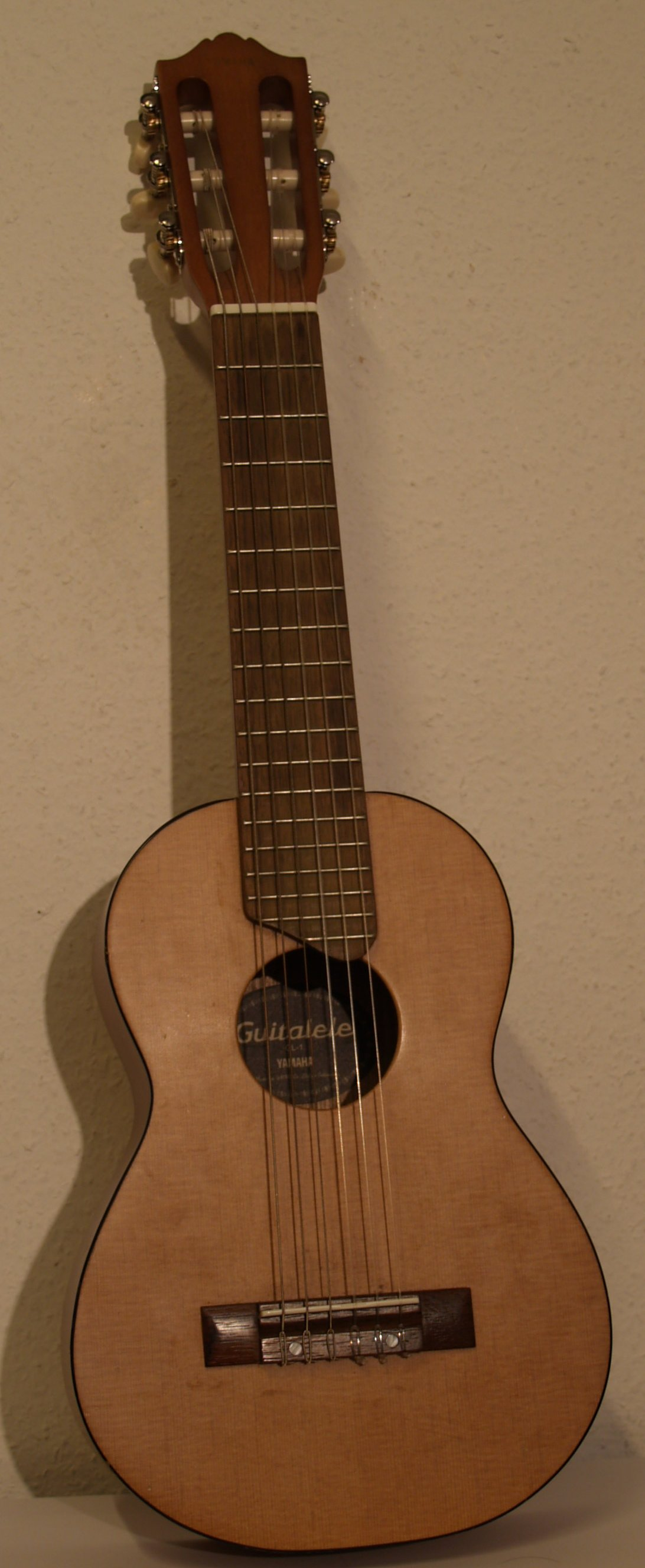 Yamaha Gitalele